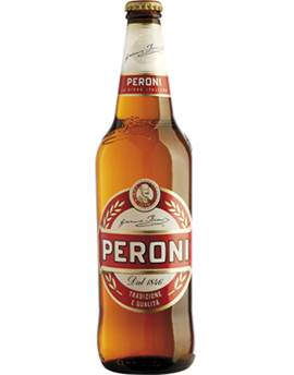 Il package di Birra Peron